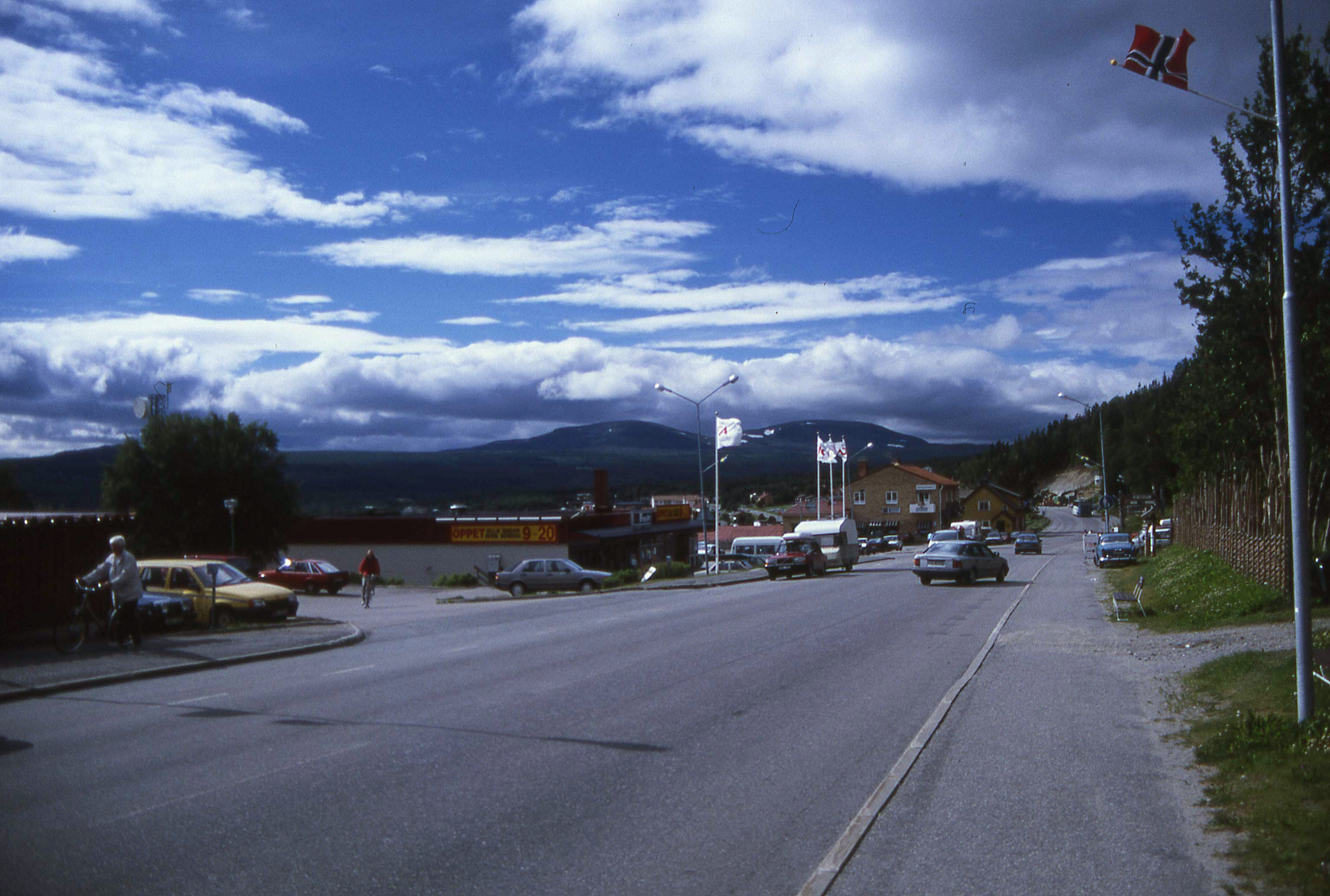 selbst fotografiert, Juli 1997